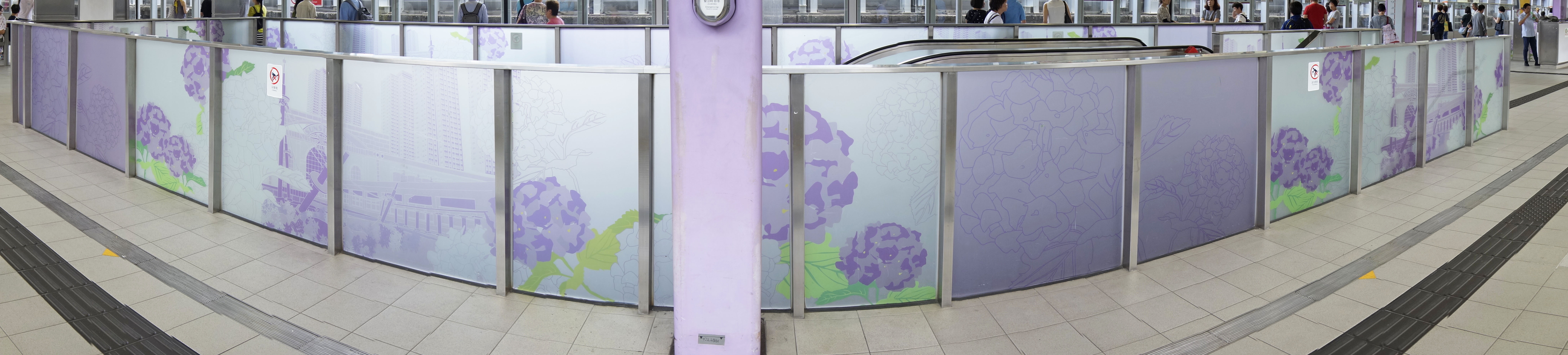 港鐵馬鞍山站月台佈置全景圖